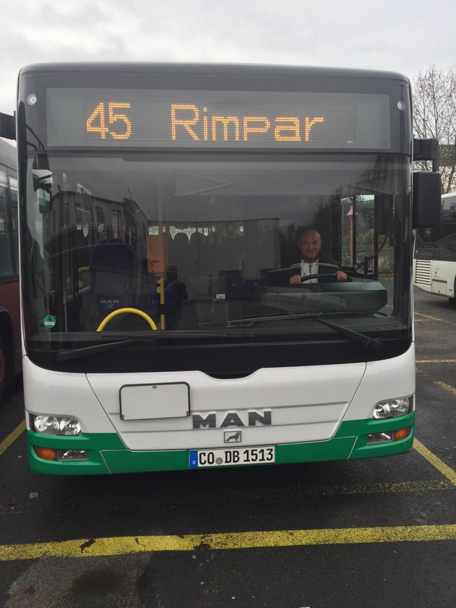 DRB-Bus VVM